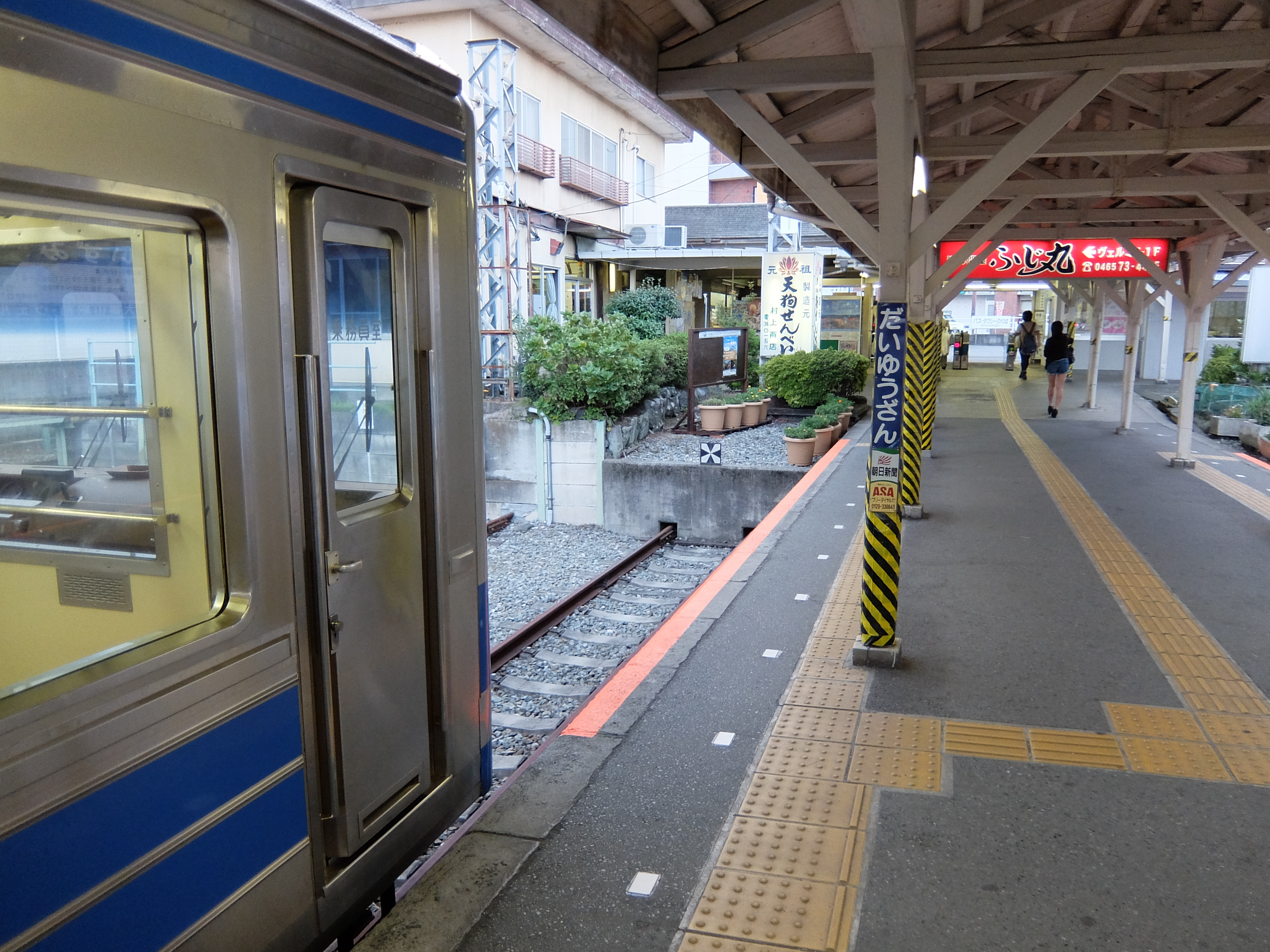 伊豆箱根鉄道 大雄山駅